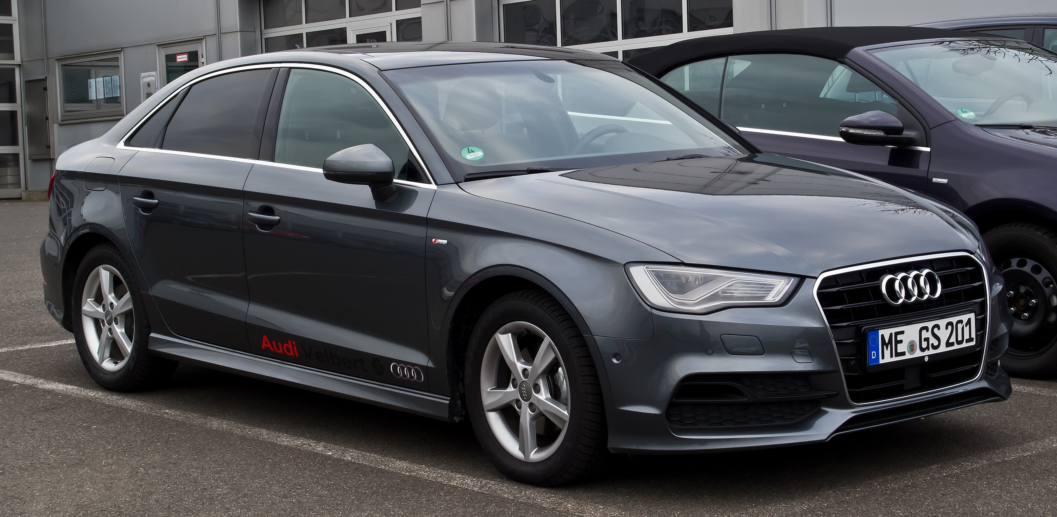 Audi A3 Limousine 2.0 TDI Ambiente S-line (8V)